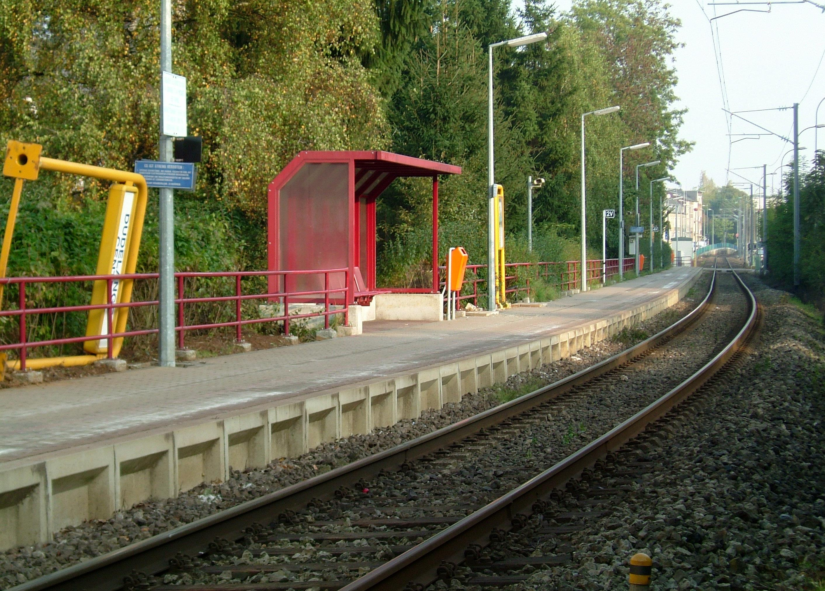 CFL-Halt Zenter Diddeleng